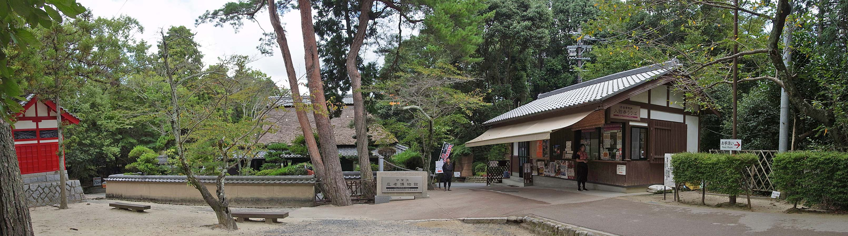 Ninja MUSEUM of Igaryu , 伊賀流忍者博物館